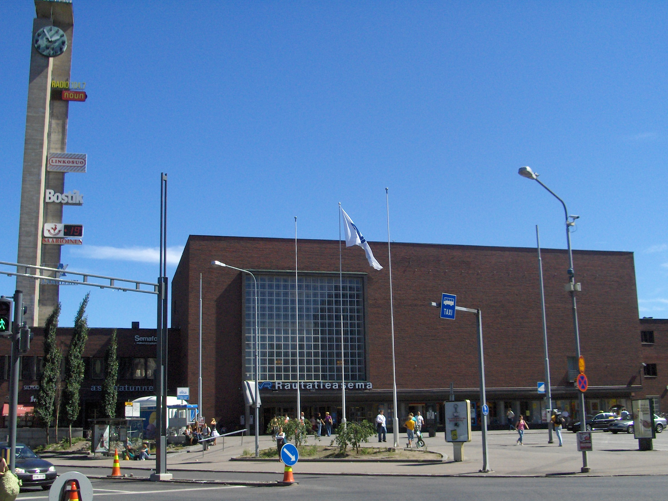 Tampereen rautatieaseman julkisivu